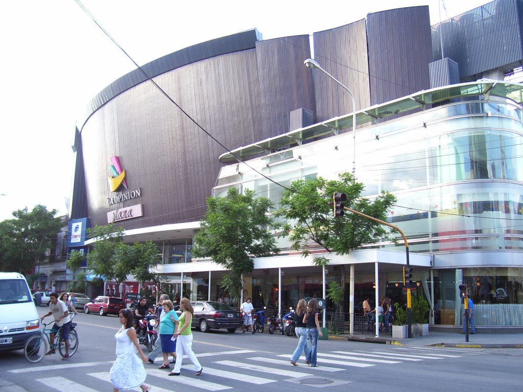 Complejo La Opinión Plaza, Julio Roca Avenue, Pergamino.